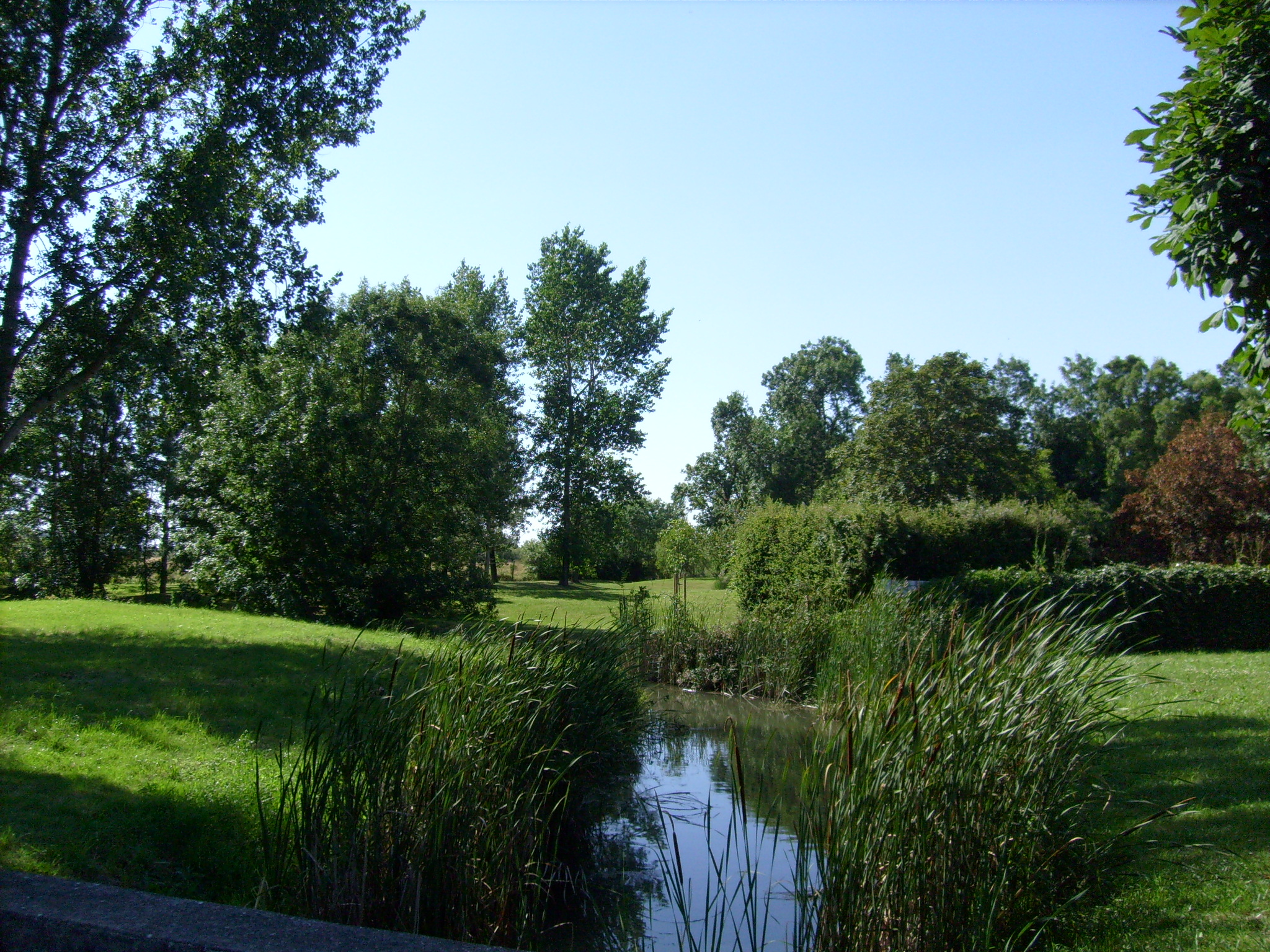 L'ancien port de Dercie ( Le Gua )